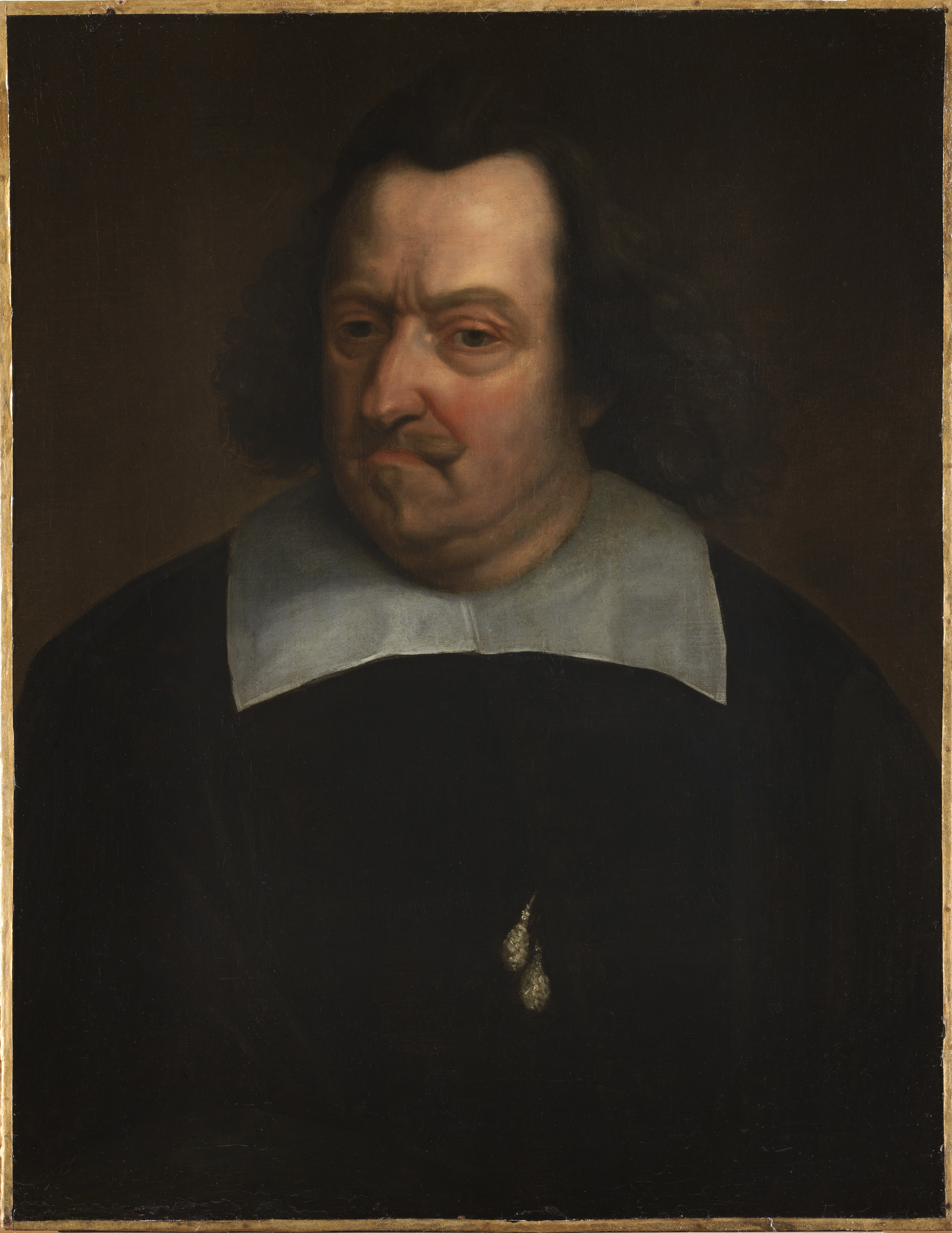 schilderij ( Balthasar van Meurs, Museum Plantin-Moretus